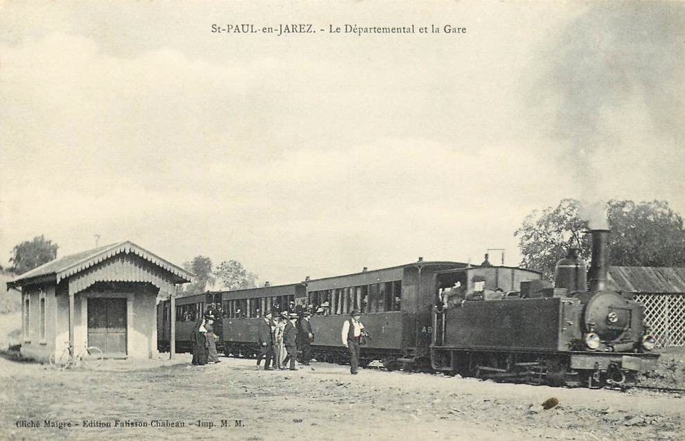 Saint-Paul-en-Jarez (Loire), le Départemental et la gare, carte postale ancienne (non grevée de droits).